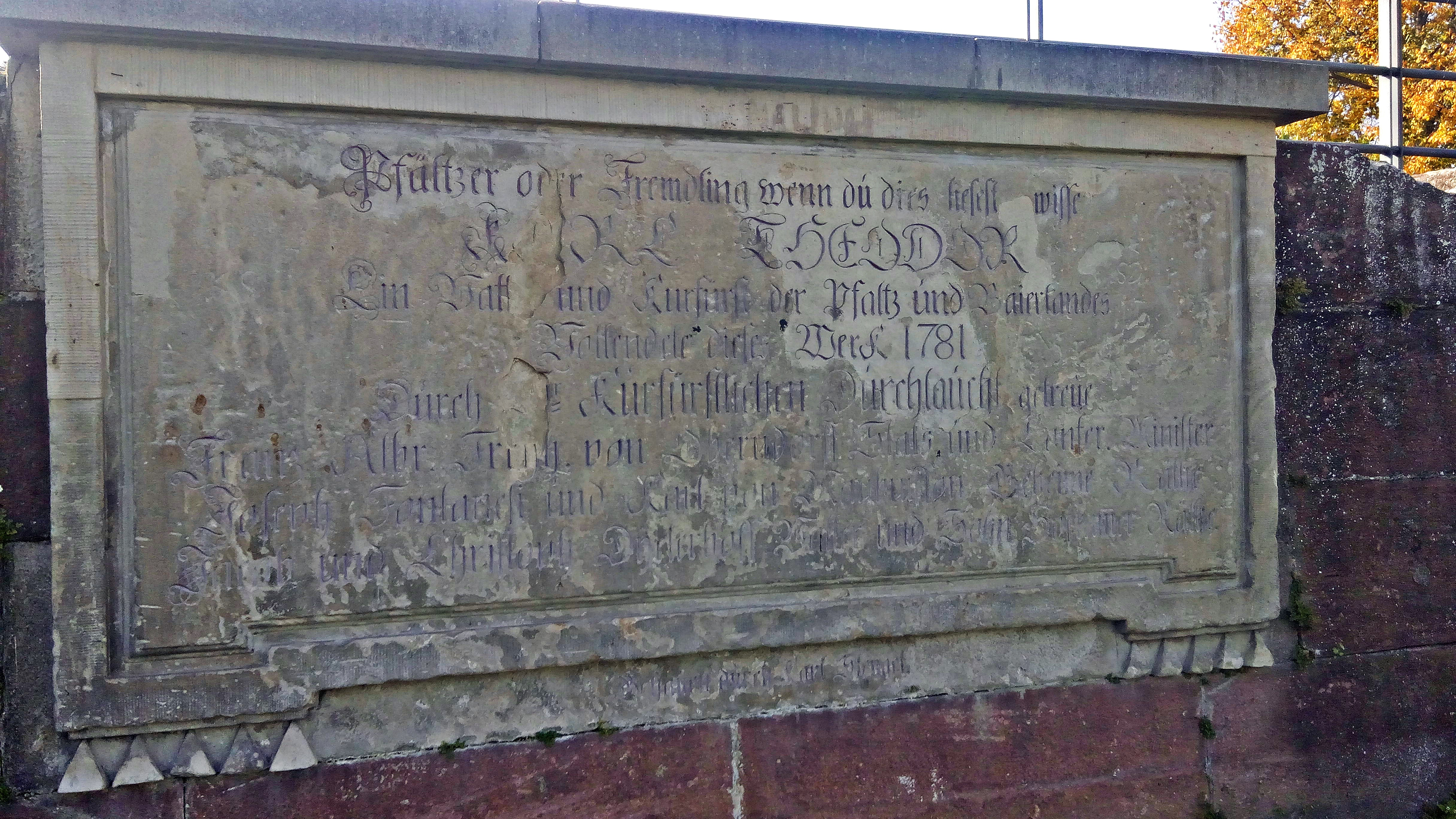 Frankenthal Kanal-Hafenbecken Widmungsstein von Kurfürst Karl Theodor in der Kaimauer (1781)